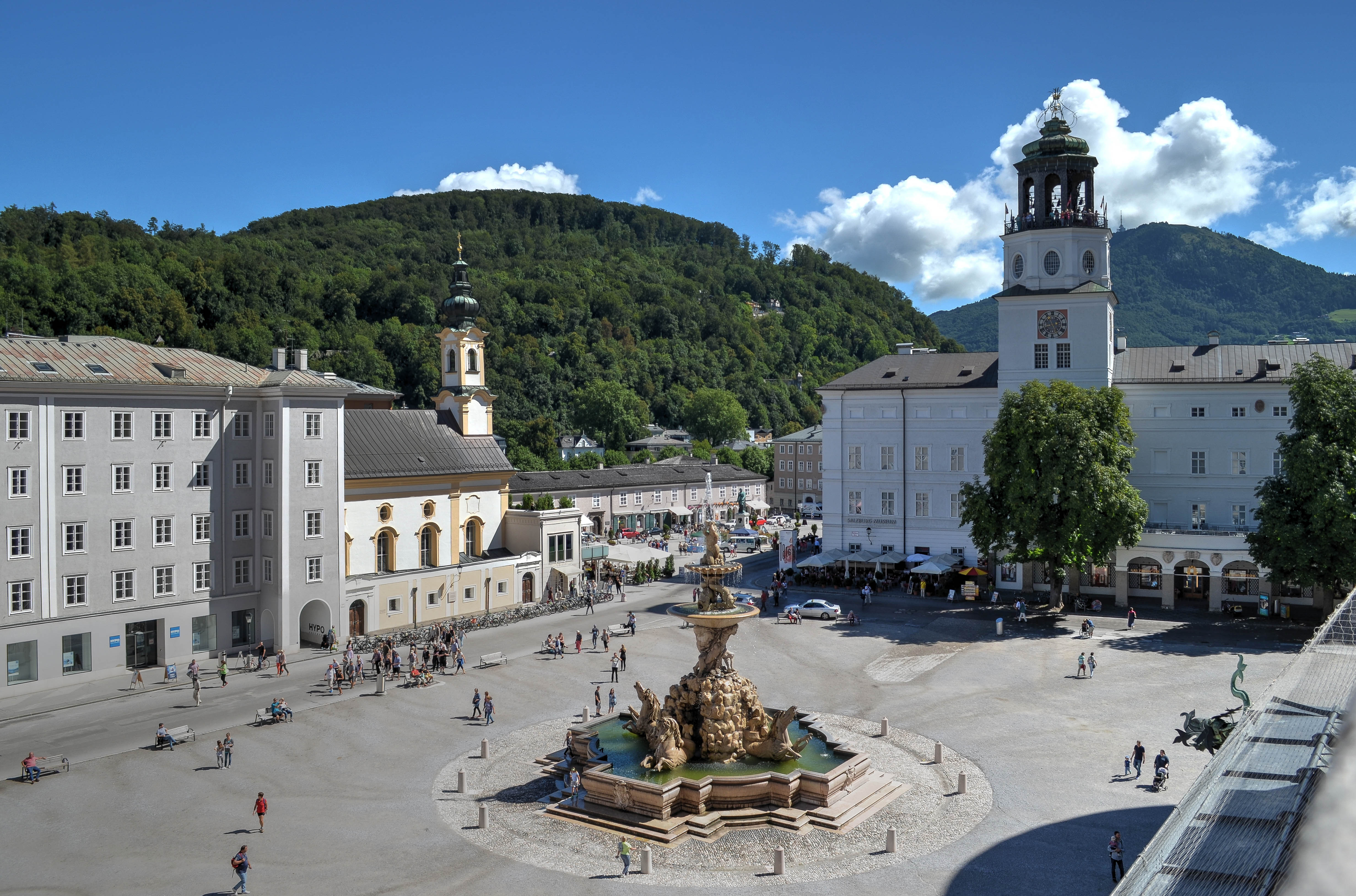 Residenzplatz, Salzburg